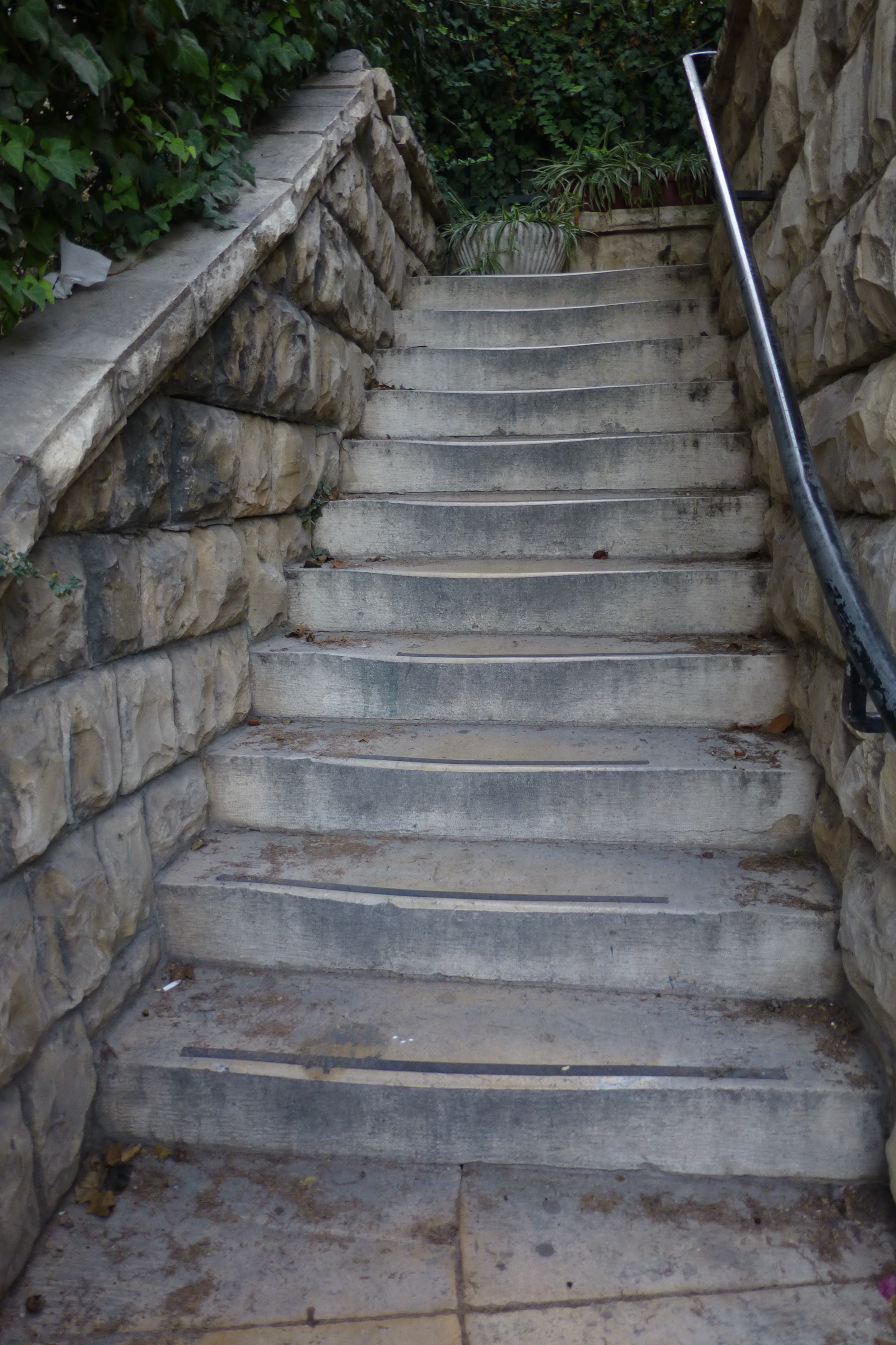 בית איצקוביץ, רח' ארלוזורוב 16, חיפה